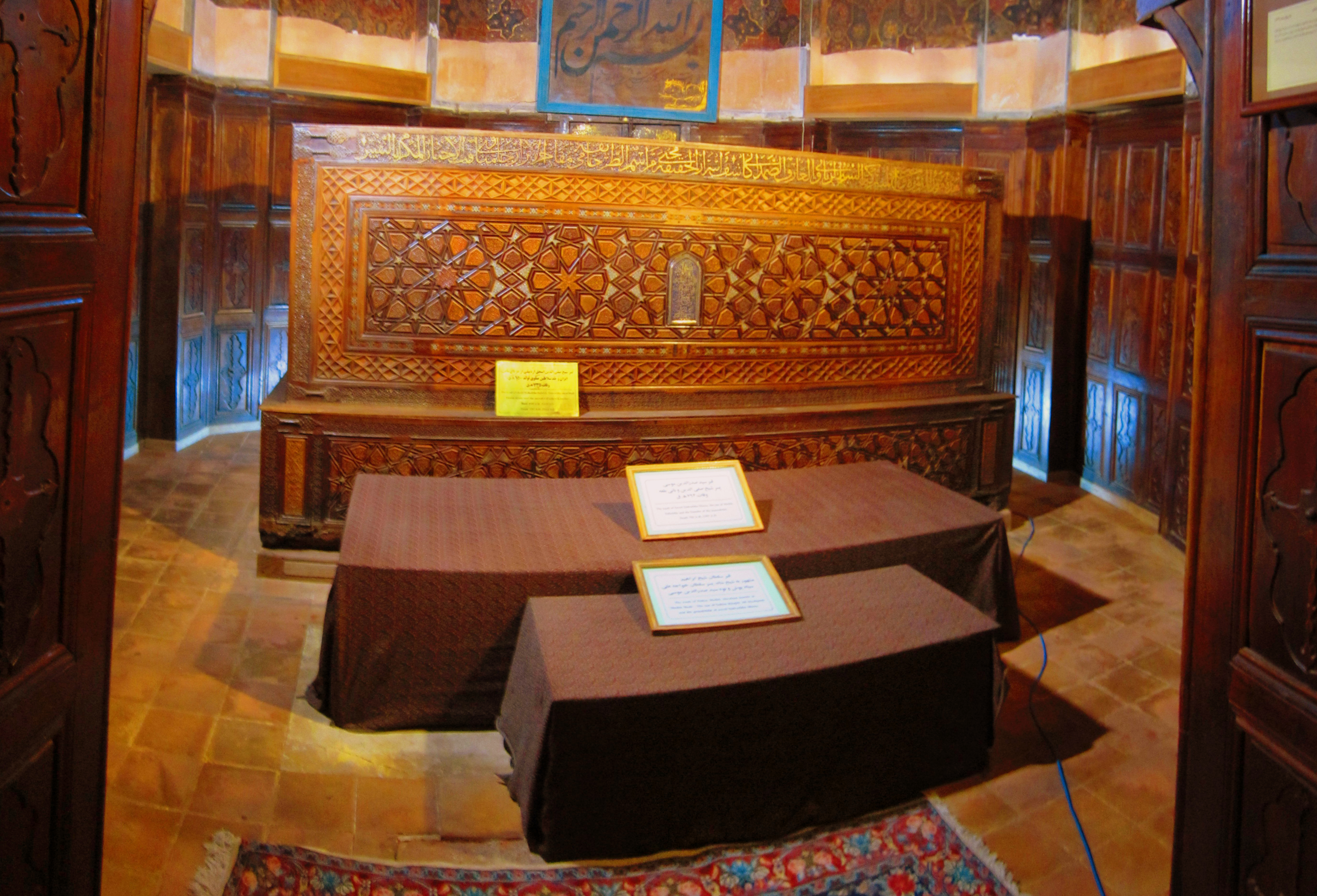 مقبره فرزندان شیخ صفی